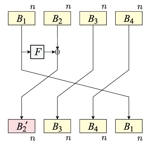 רשת פייסטל כללית מסוג 1